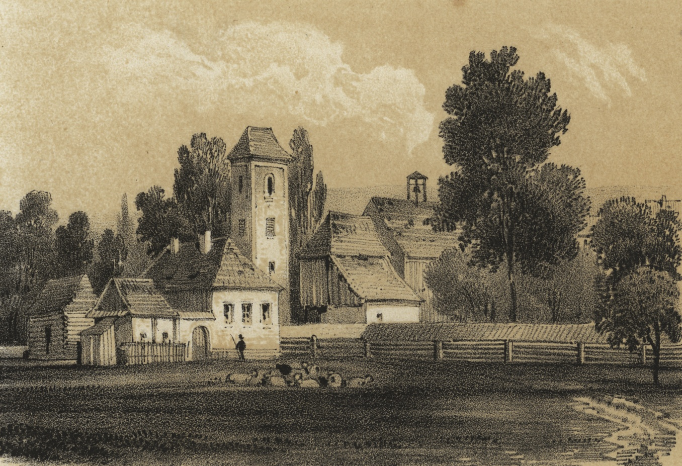 Luková